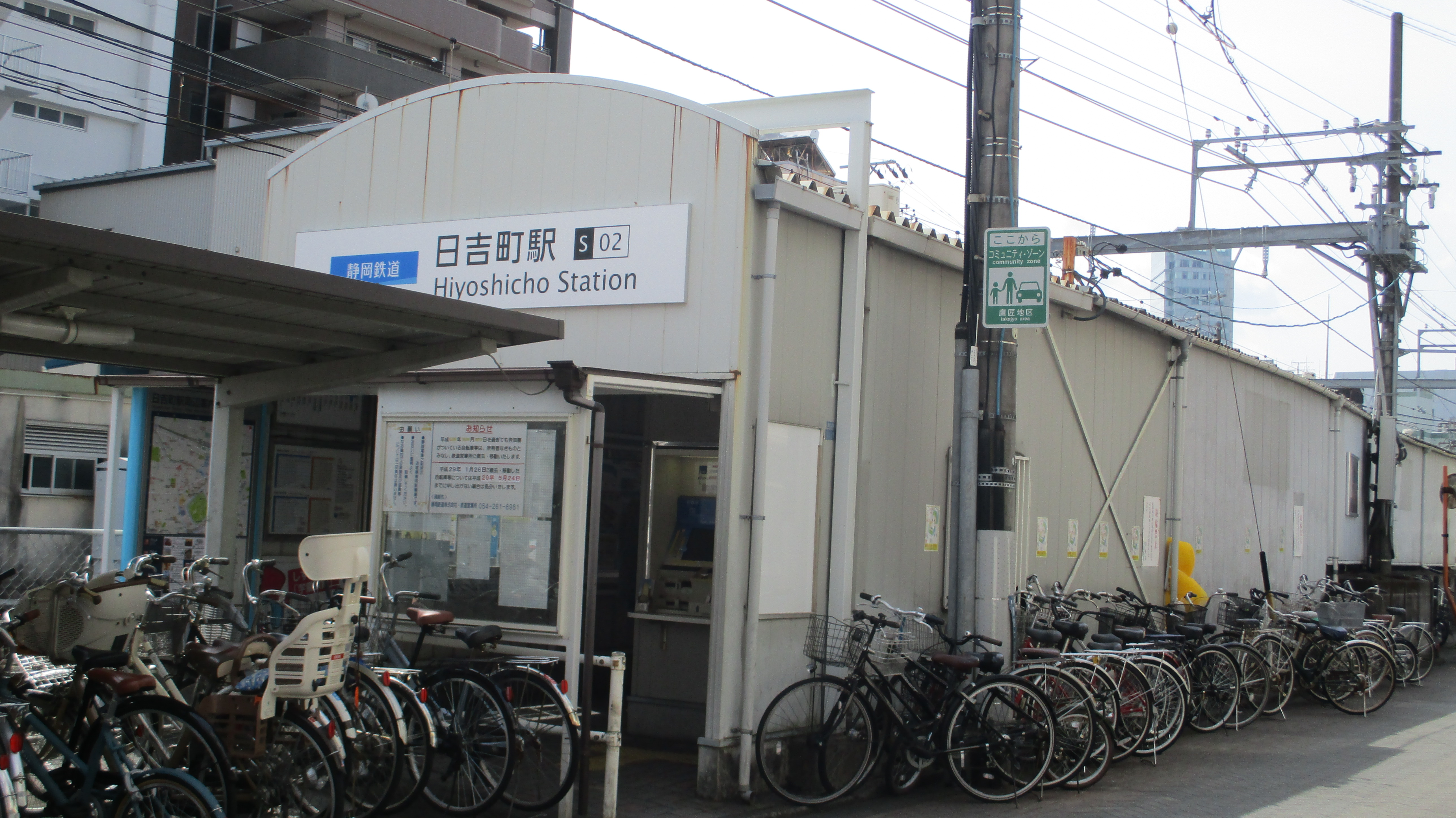 静岡鉄道日吉町駅の駅舎